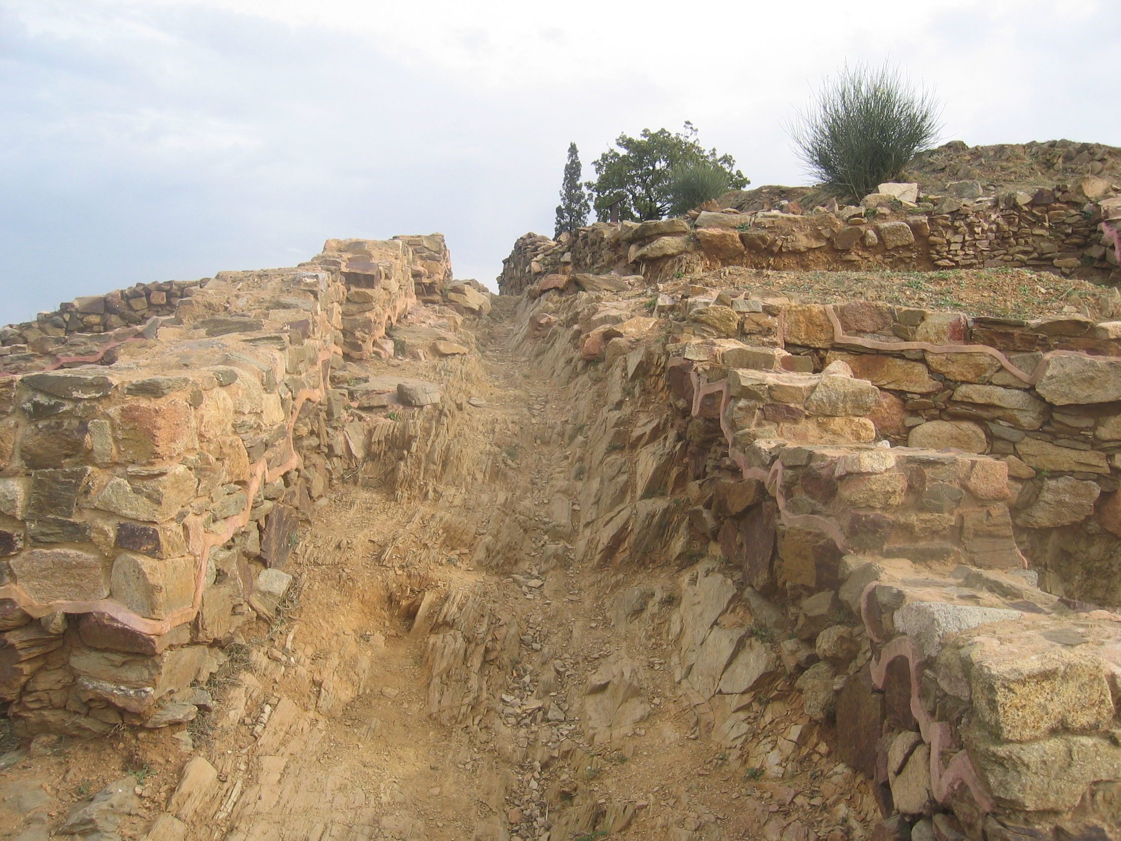 Detall del Poblat Ibèric del Puig Castellar, a Santa Coloma de Gramanet.